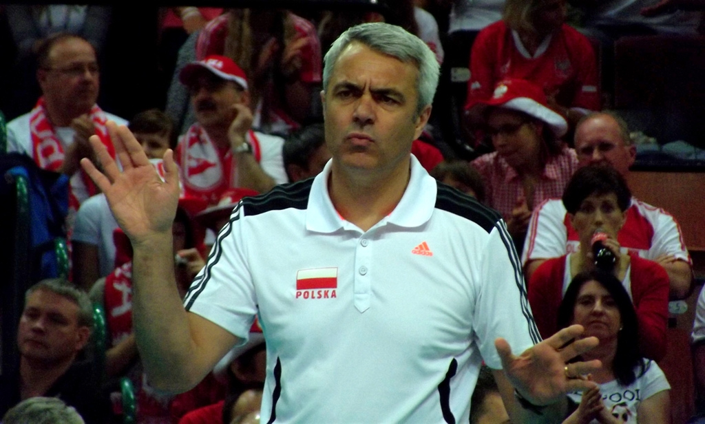 Zdjęcie zrobione podczas zawodów Ligi Światowej 2012 w katowickim Spodku.